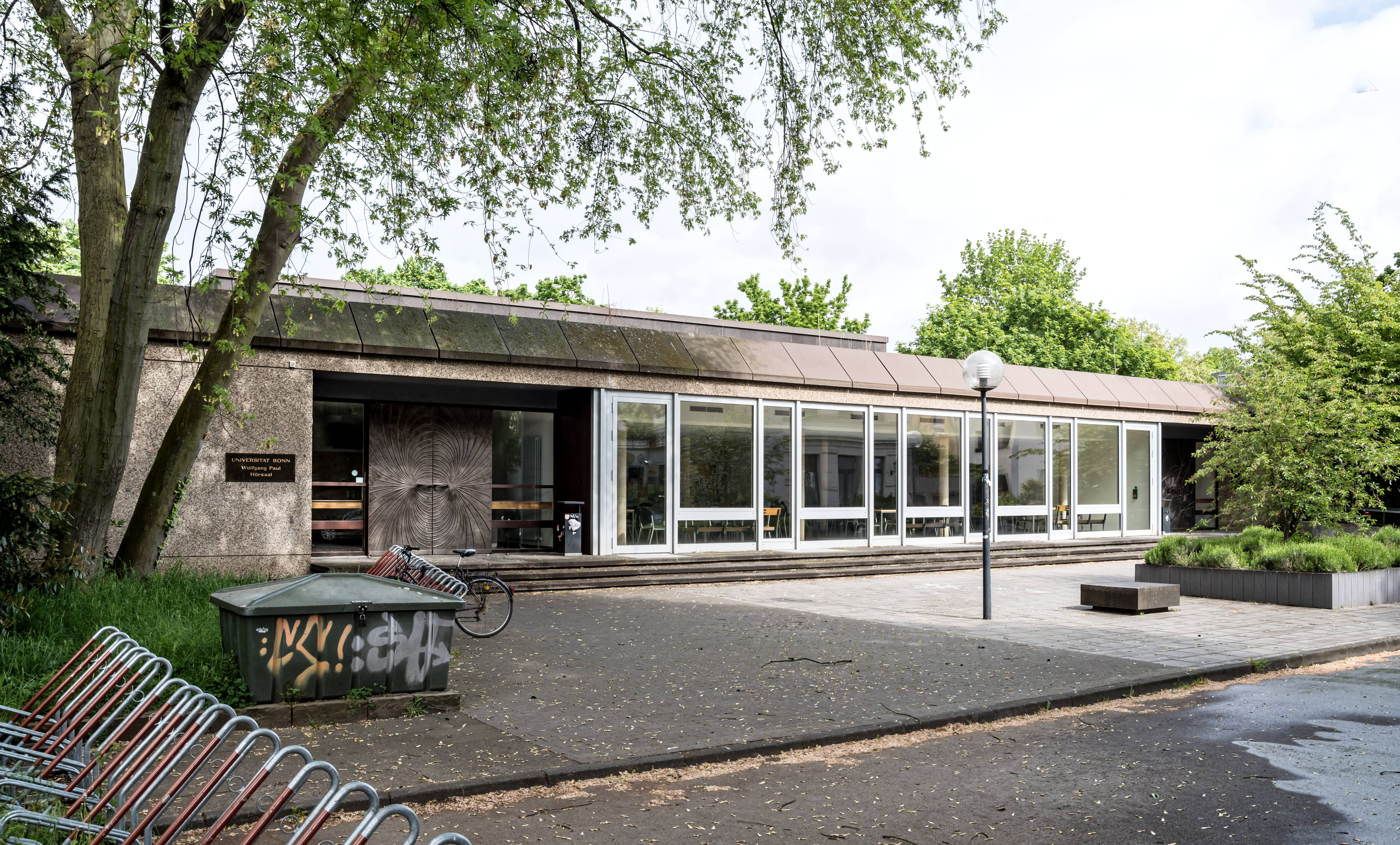 Wolfgang-Paul-Hörsaal der Universität Bonn (größter Hörsaal der Physikalischen Institute), Wegelerstraße 14/Kreuzbergweg 28, Bonn-Poppelsdorf